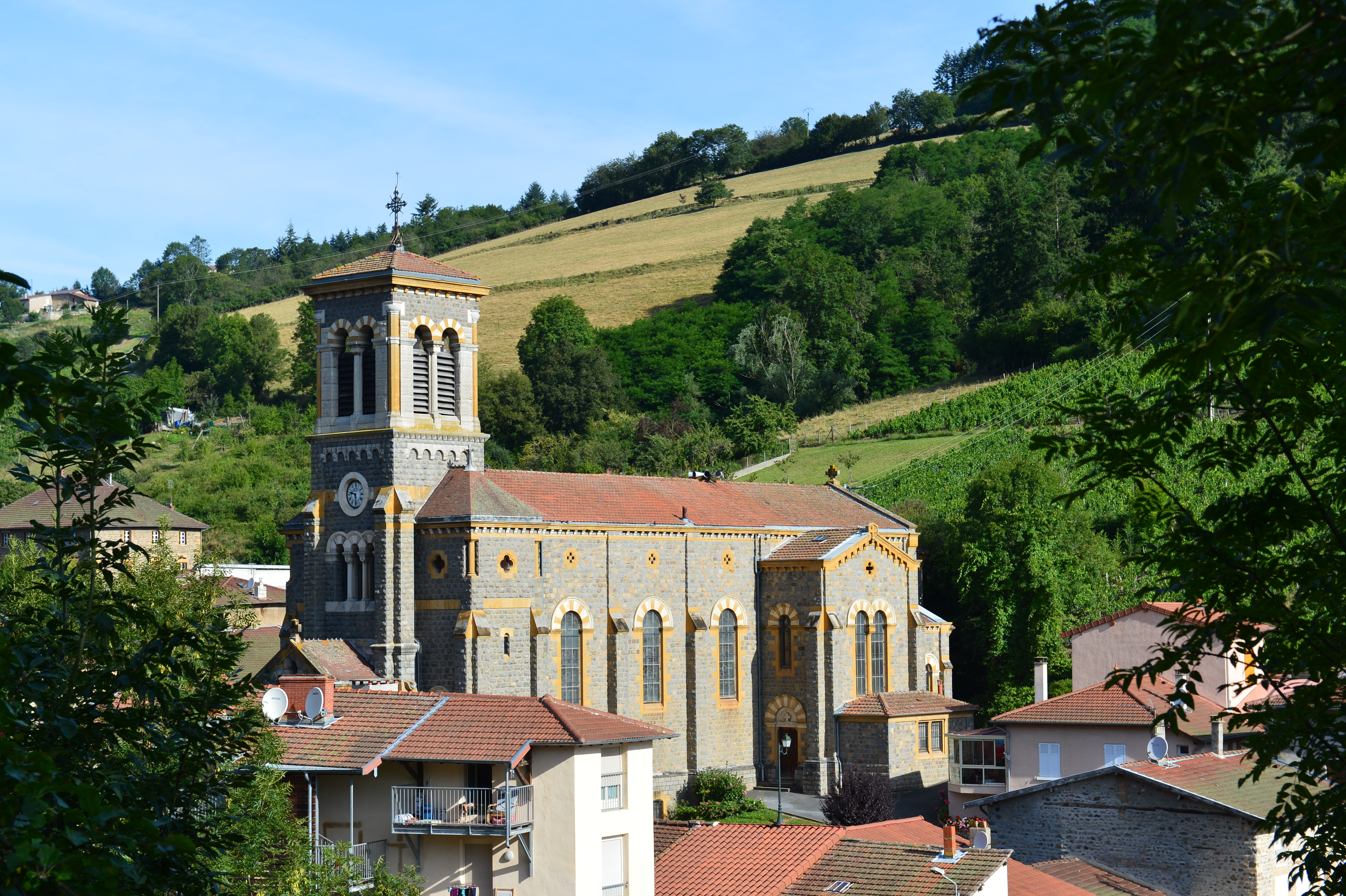 Église Saint-Clément